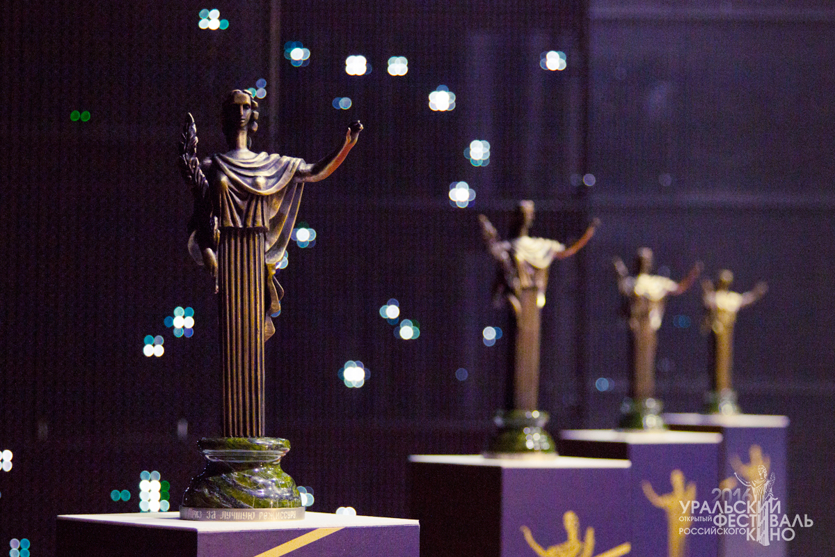 Призовая статуэтка